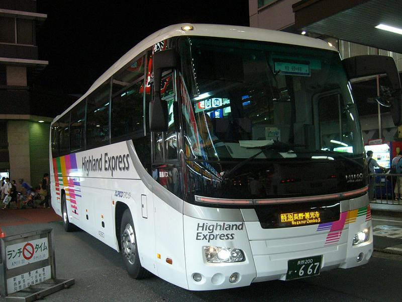 登録番号：長野200か667 川中島バス所属 新宿 - 長野線用 日野・セレガ PKG-RU1ESAA